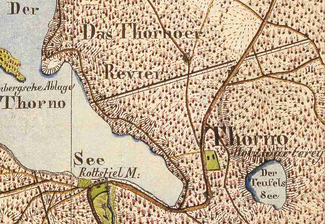 Die Wohnplätze Rottstiel und Tornom auf dem Urmesstischblatt 2942 Gühlen-Neuglienecke von 1825